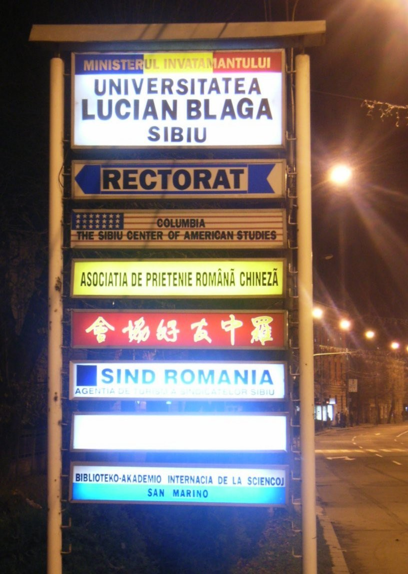 Hermannstadt, Schild vor dem Rektorat der Lucian-Blaga-Universität